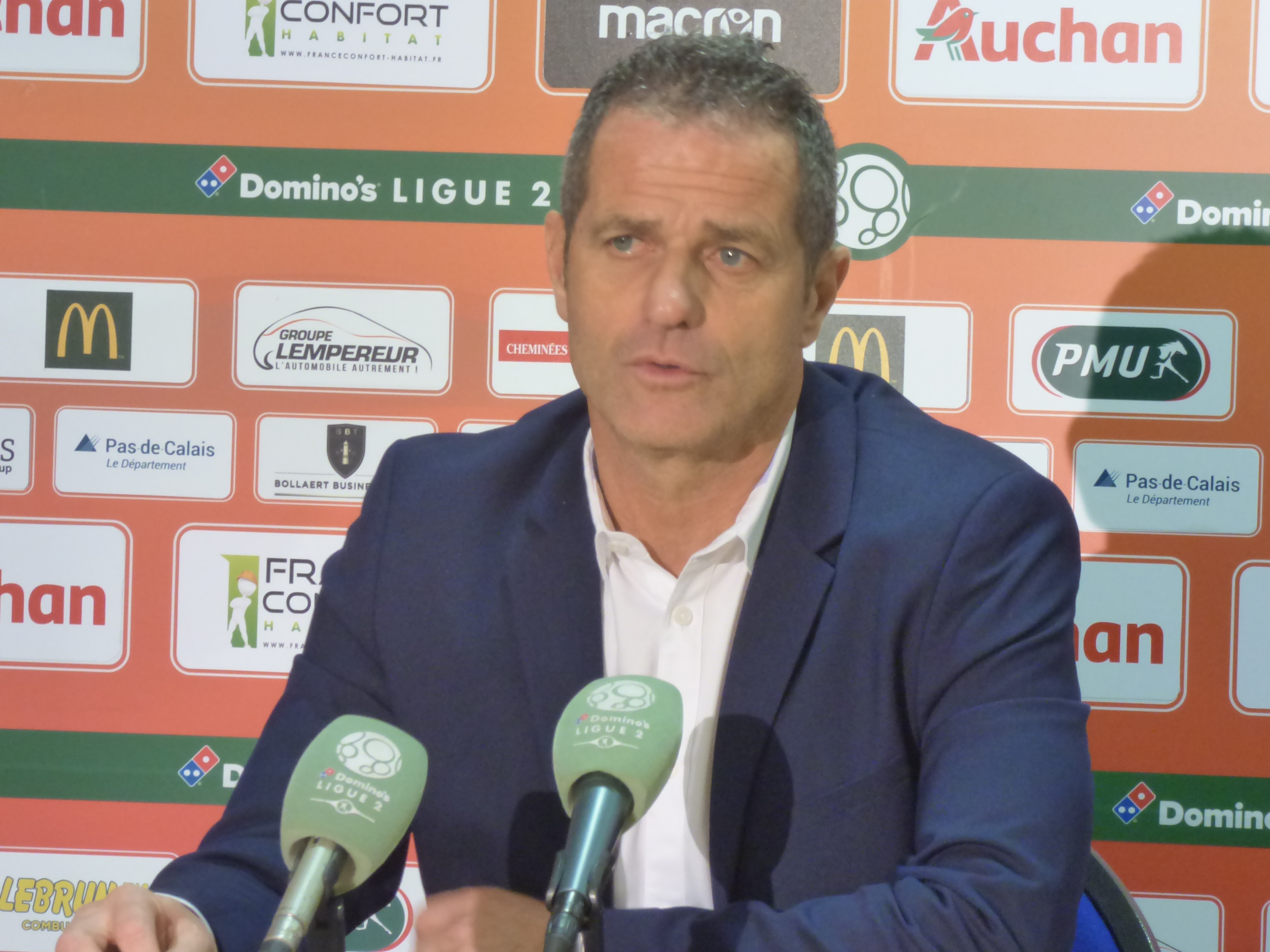 Philippe Hinschberger après le match RC Lens / Grenoble Foot 38, le 24 novembre 2018, comptant pour la quinzième journée du championnat de France de football de Ligue 2 2018-2019, au Stade Bollaert-Delelis.